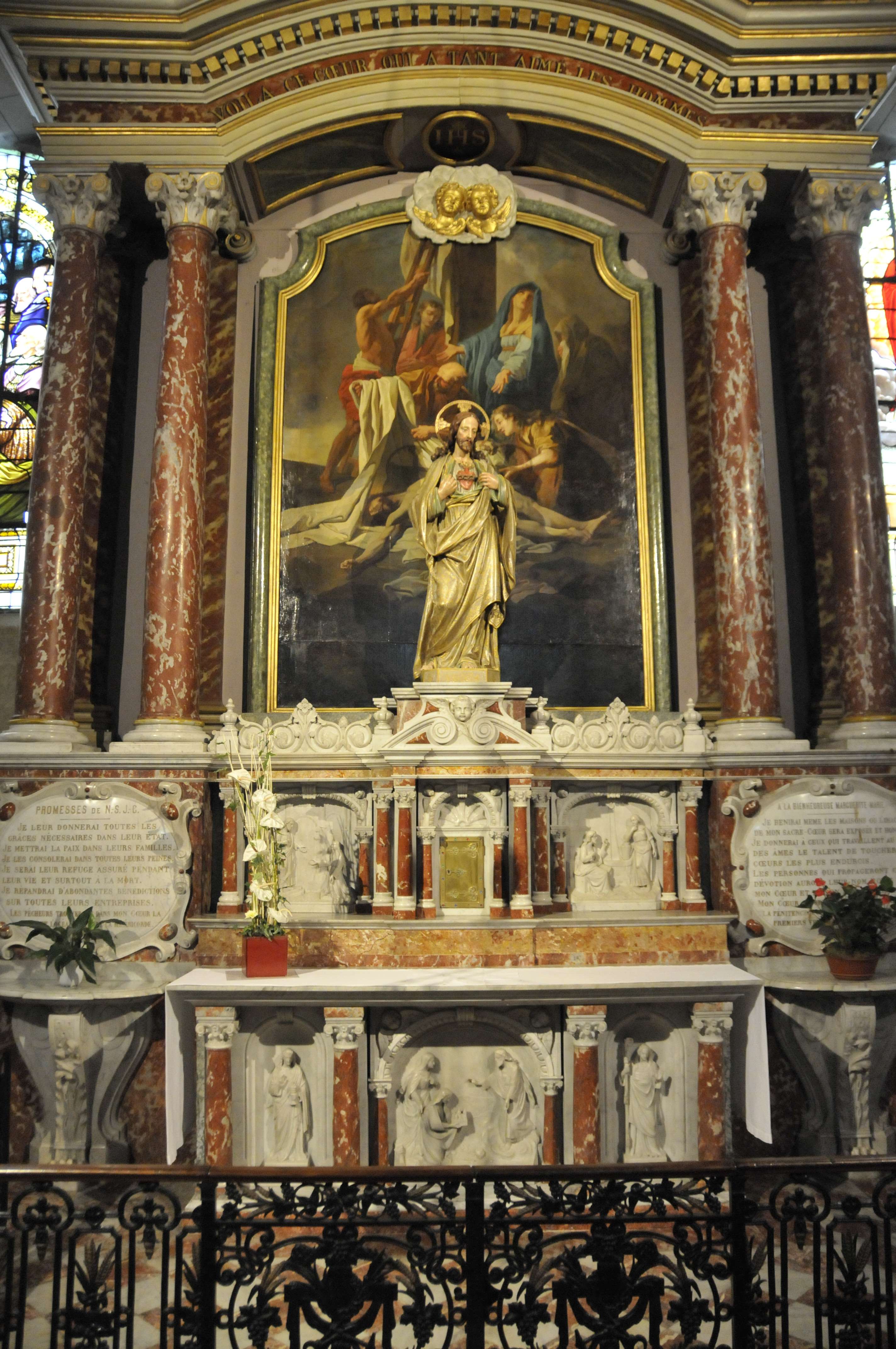 Dax